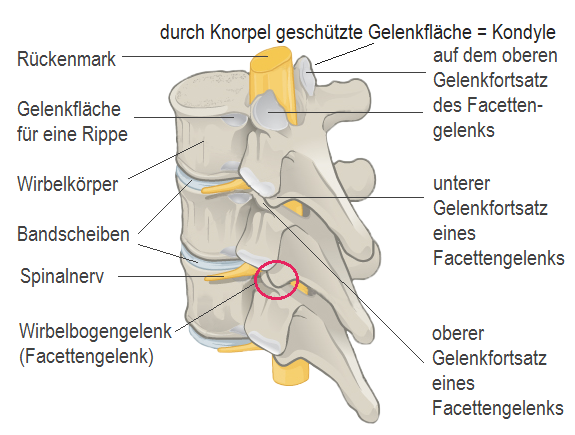 Wirbelknochen mit Rückenmark, Spinalnerven und Facettengelenken